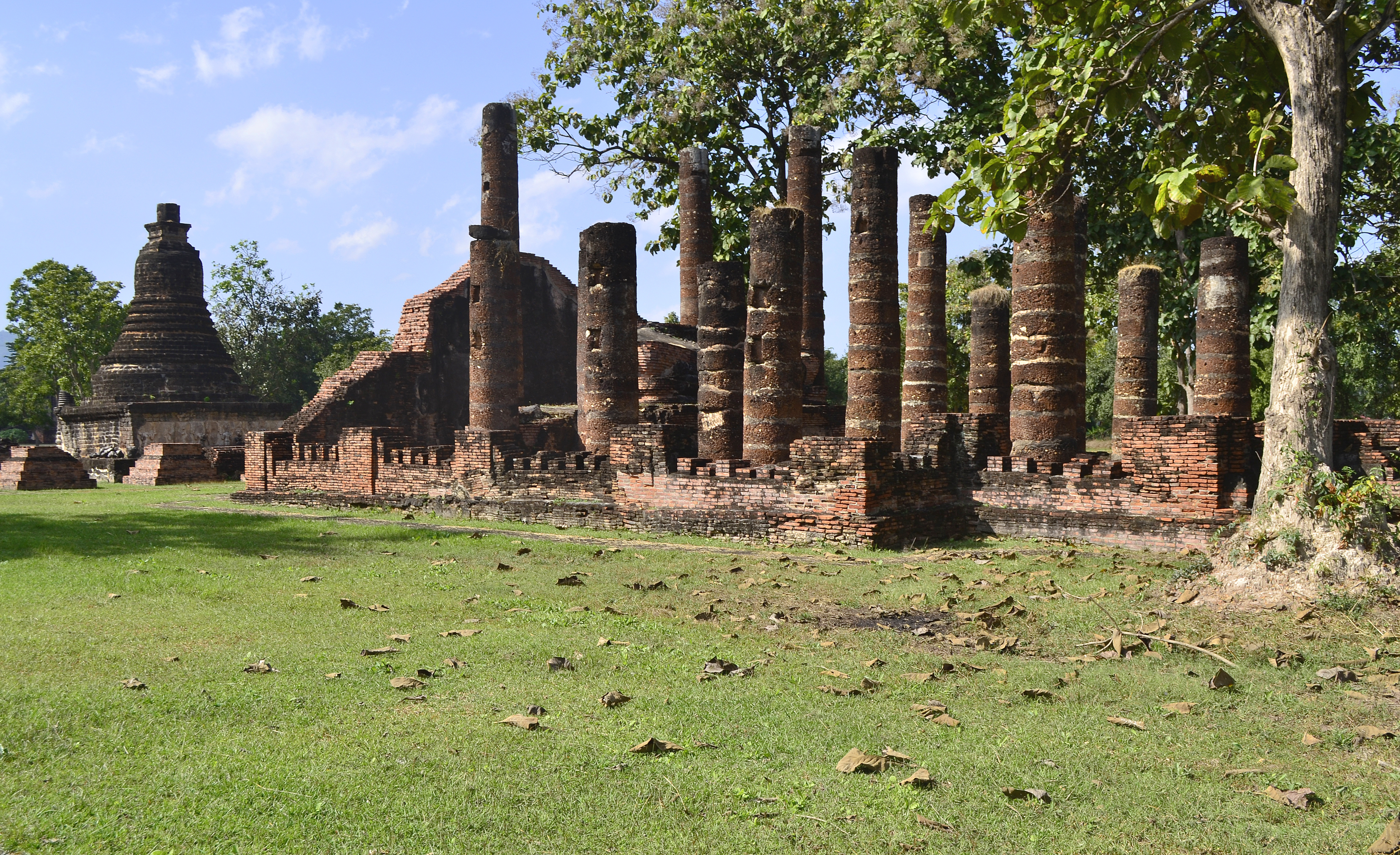 Wat Chedi Si Hong im Geschichtspark Sukhothai